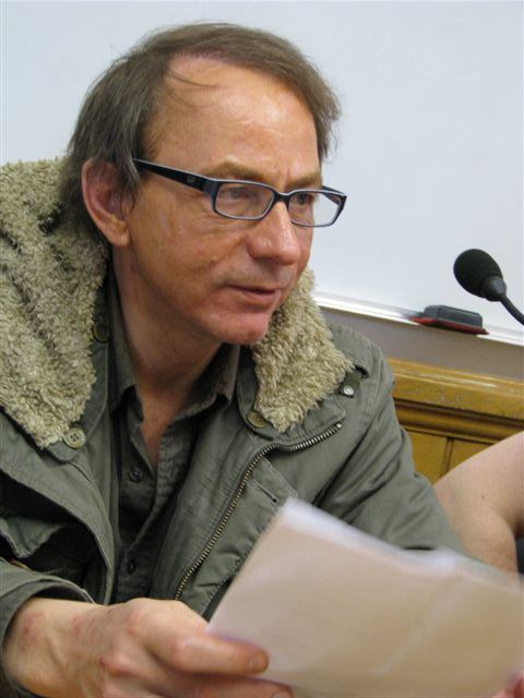 Michel Houellebecq (b. 1958), French writer